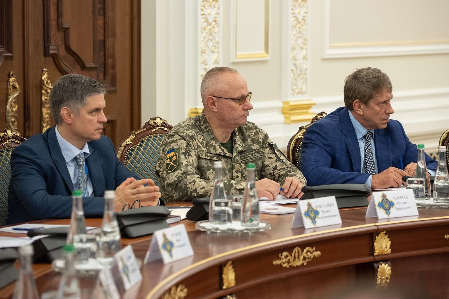 Президент Украины Владимир Зеленский провел совещание с участием членов Совета национальной безопасности и обороны Украины, посвященное энергетической безопасности.